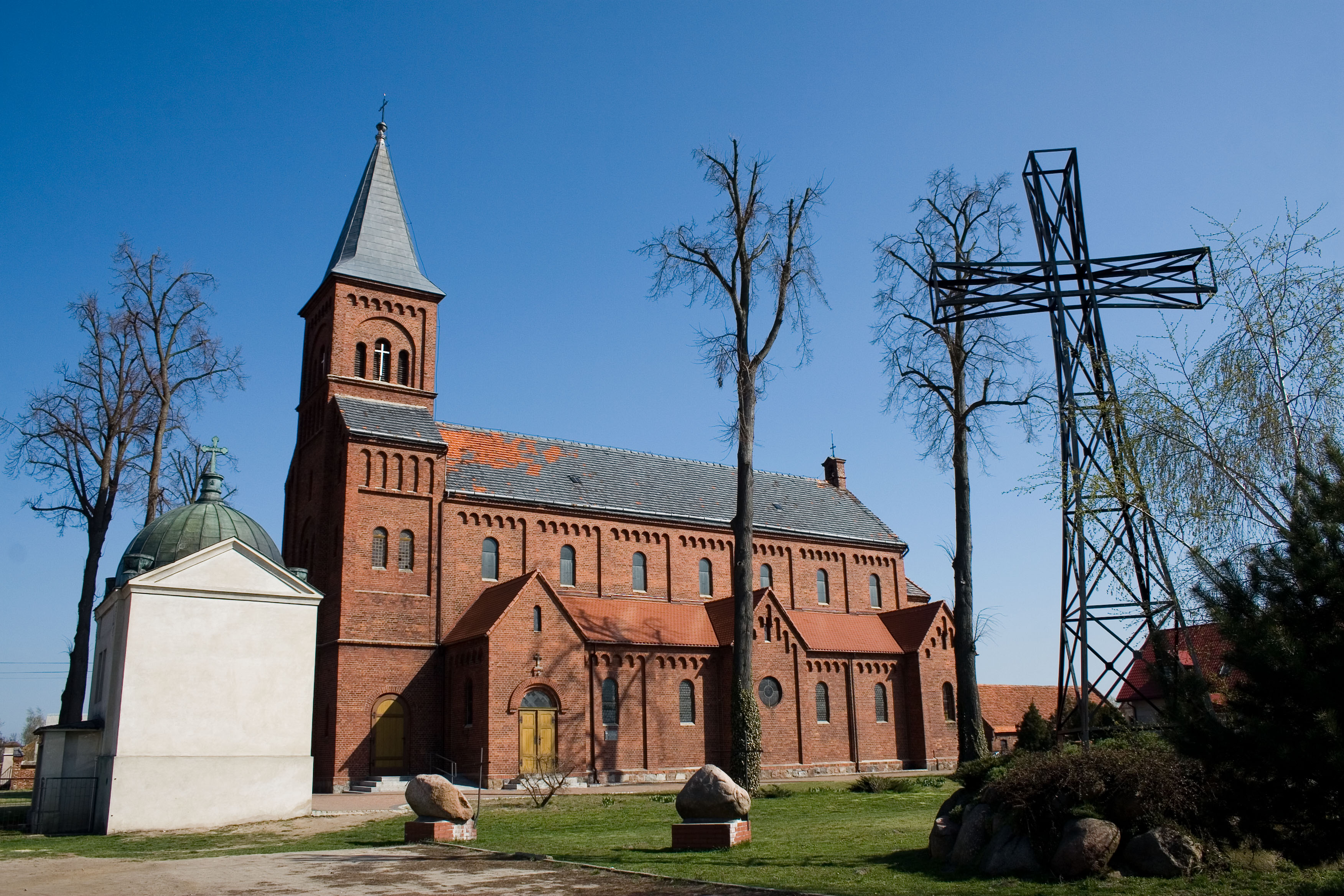 Kościół pw. św. Stanisława Kostki w Doruchowie.